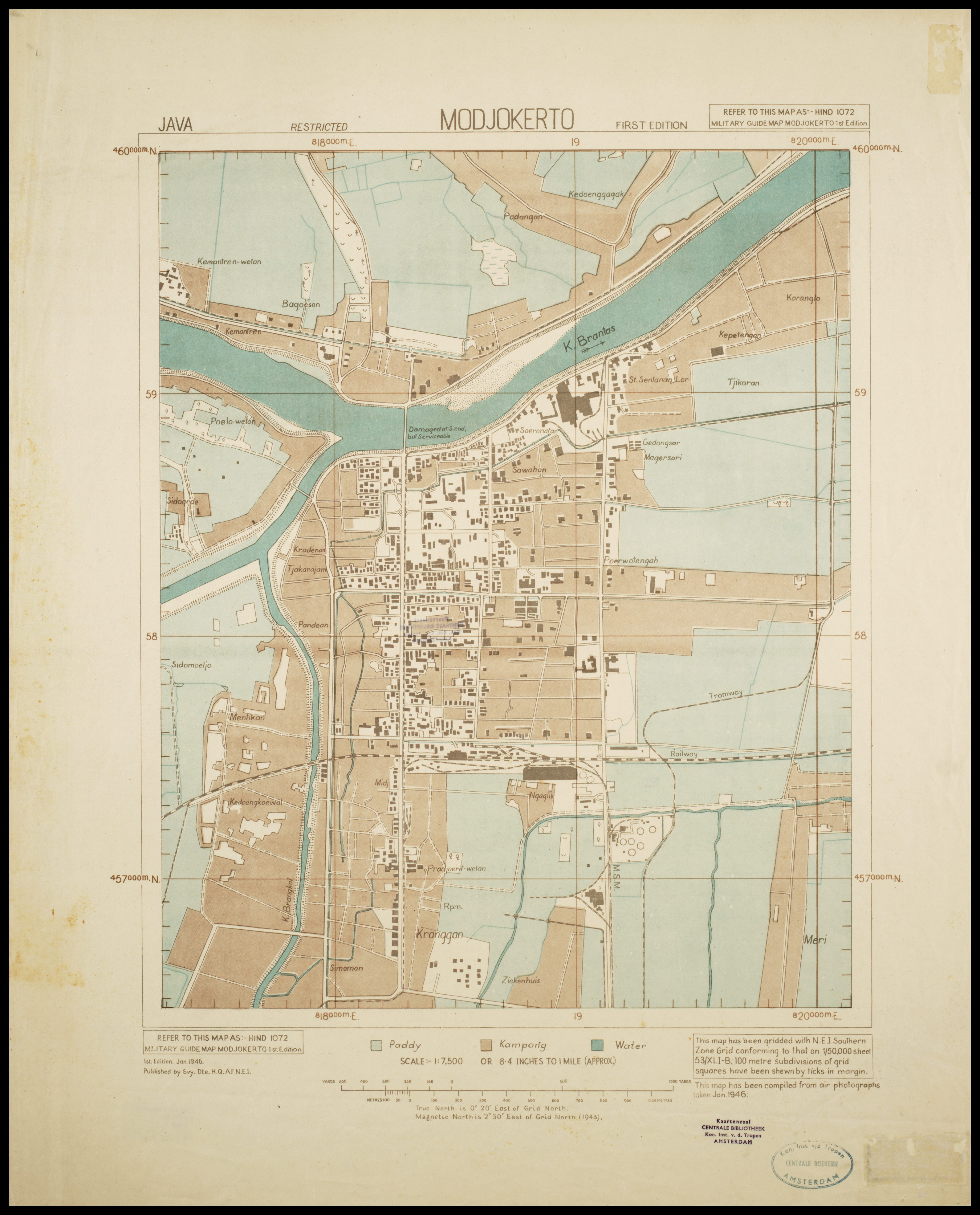 Peta MoJokerto pada tahun 1946.